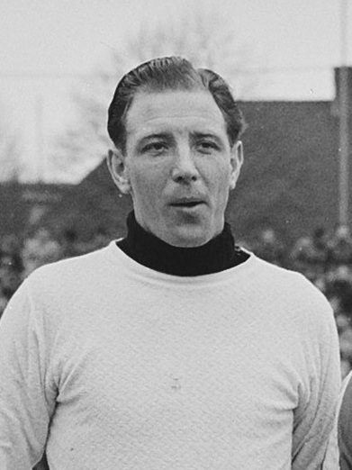 Lieuwe Steiger in 1952.